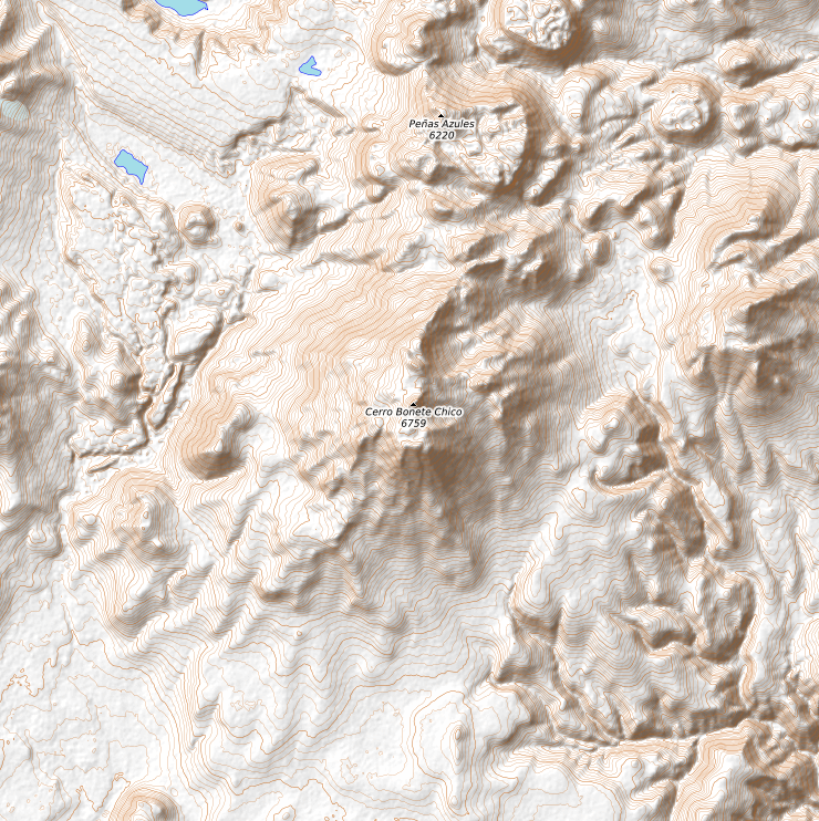 carte réalisée sur umap This map may be incomplete, and may contain errors. Don't rely solely on it for navigation.